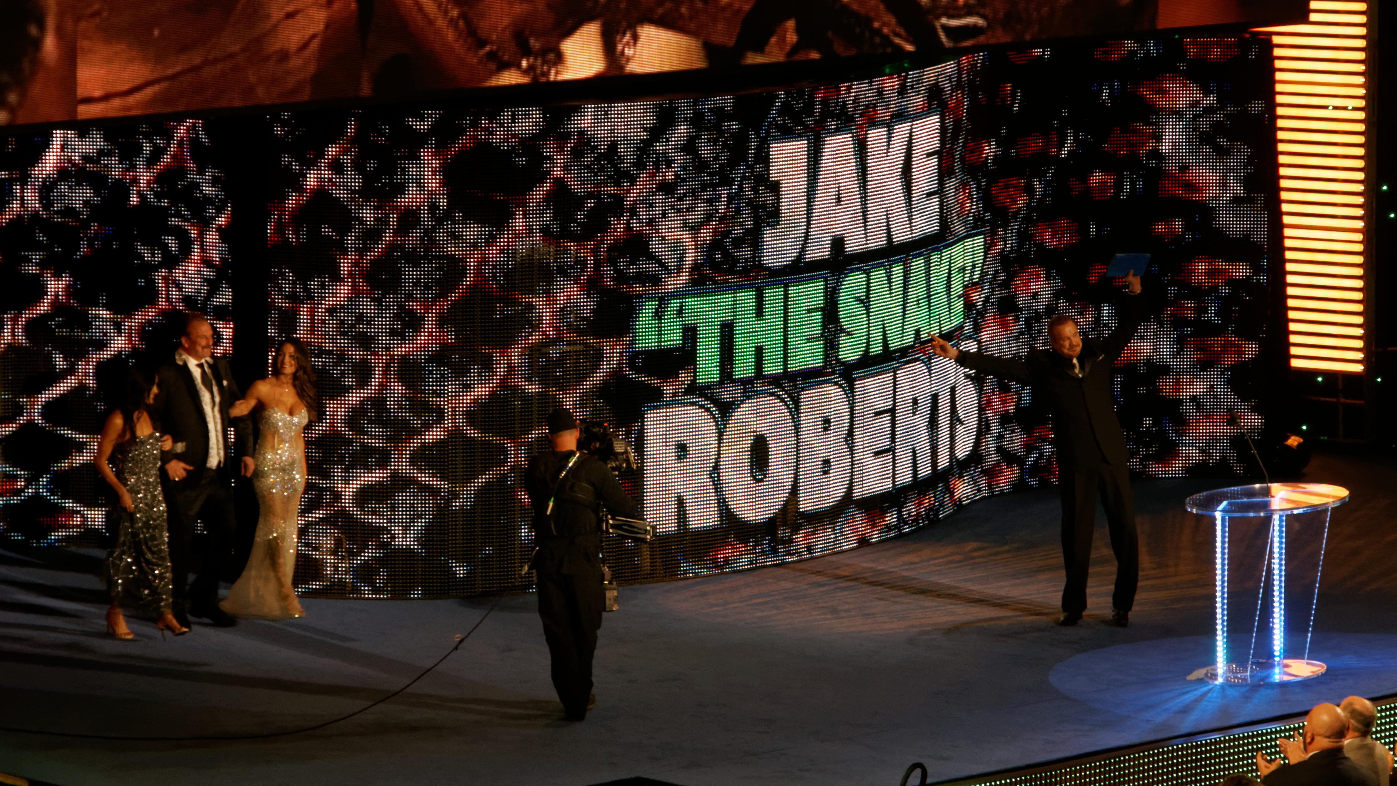 2014-04-05_21-01-28_NEX-6_8620_DxO